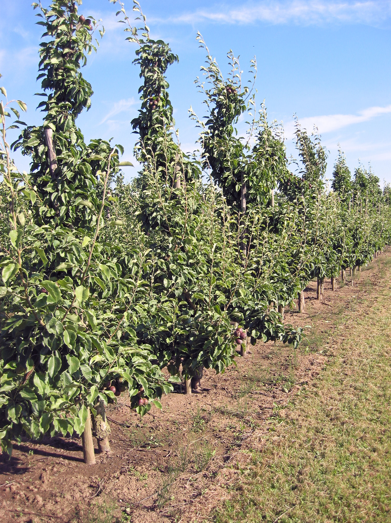 Perenboomgaard